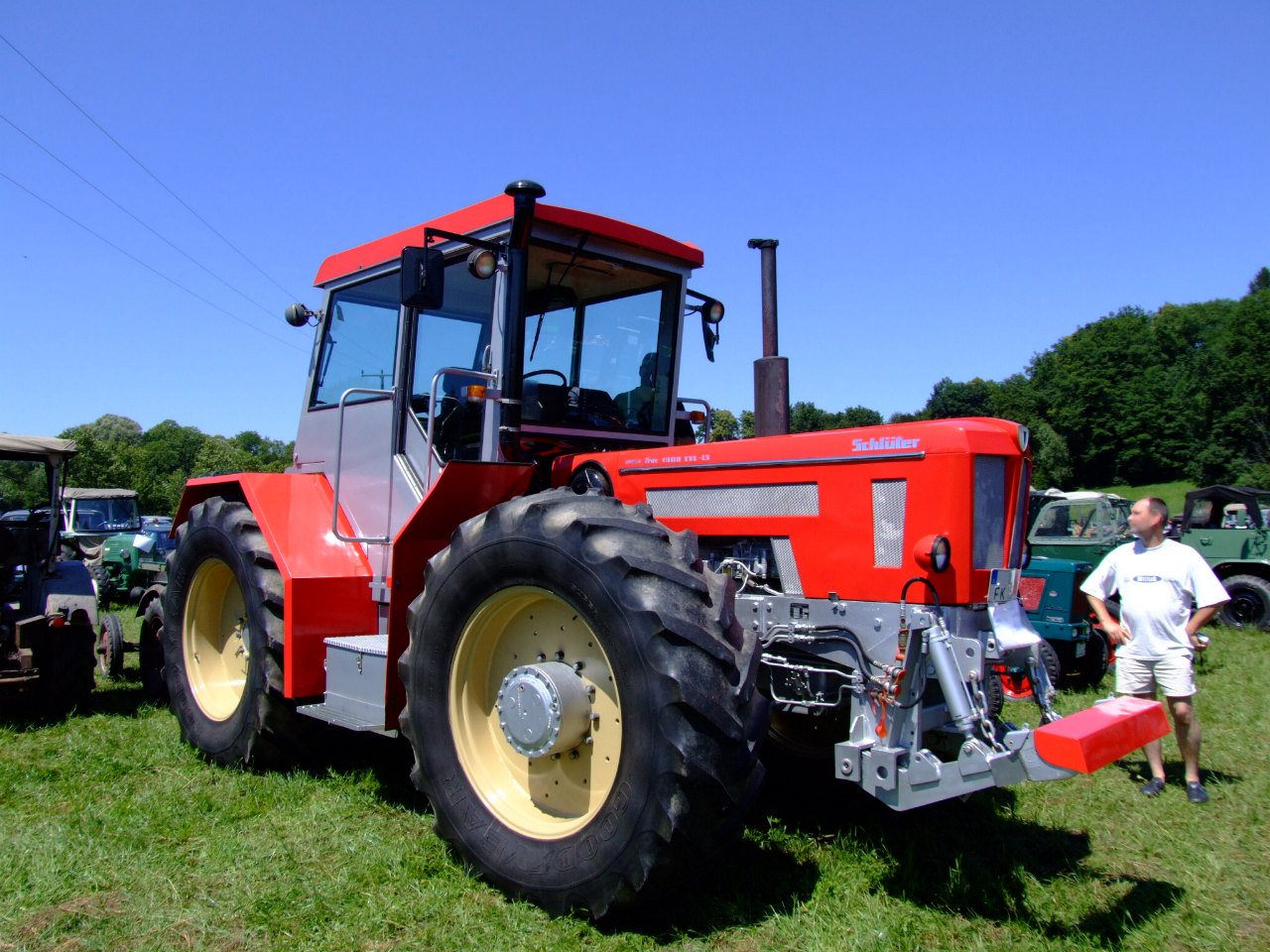 Schlüter SuperTrac 1900 TVL LS